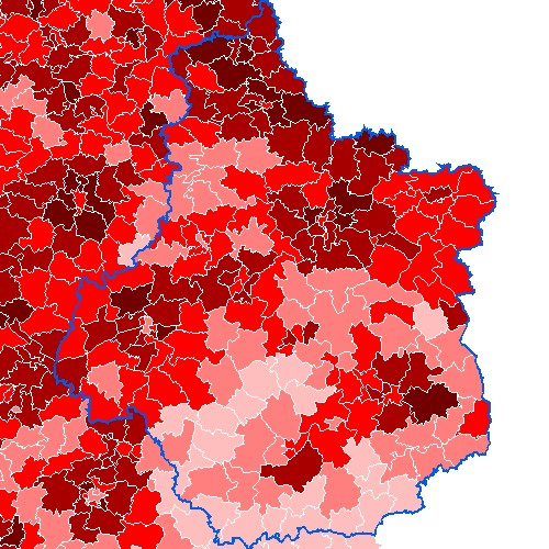 Carte de la proportion des moins de 20 ans dans la population de la rÃ©gion Centre, par cantons, en 1999. LÃ©gende : Image:-20ans1999-canton legende.jpg Cette carte est généreusement fournie par l'IAAT (Institut atlantique d'amÃ©nagement du territoire) Je la place comme convenu avec eux sous licence GFDL Utilisateur:Archeos Catégorie:Carte dÃ©mographique Catégorie:Image GFDL - Société